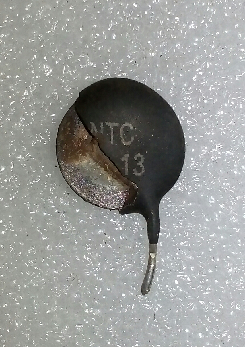 পুড়ে যাওয়া থার্মিস্টর